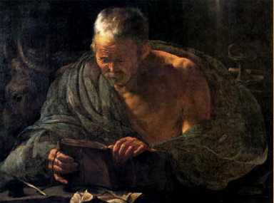 Hendrick Terbrugghen (Ter Brugghen) - Saint Luke